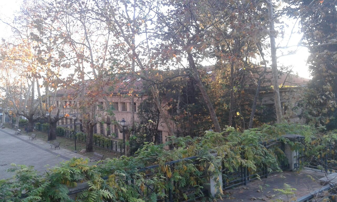 Padiglione est dell'ex seminario regionale Pio XI, visto dal Parco del Seminario di Salerno.